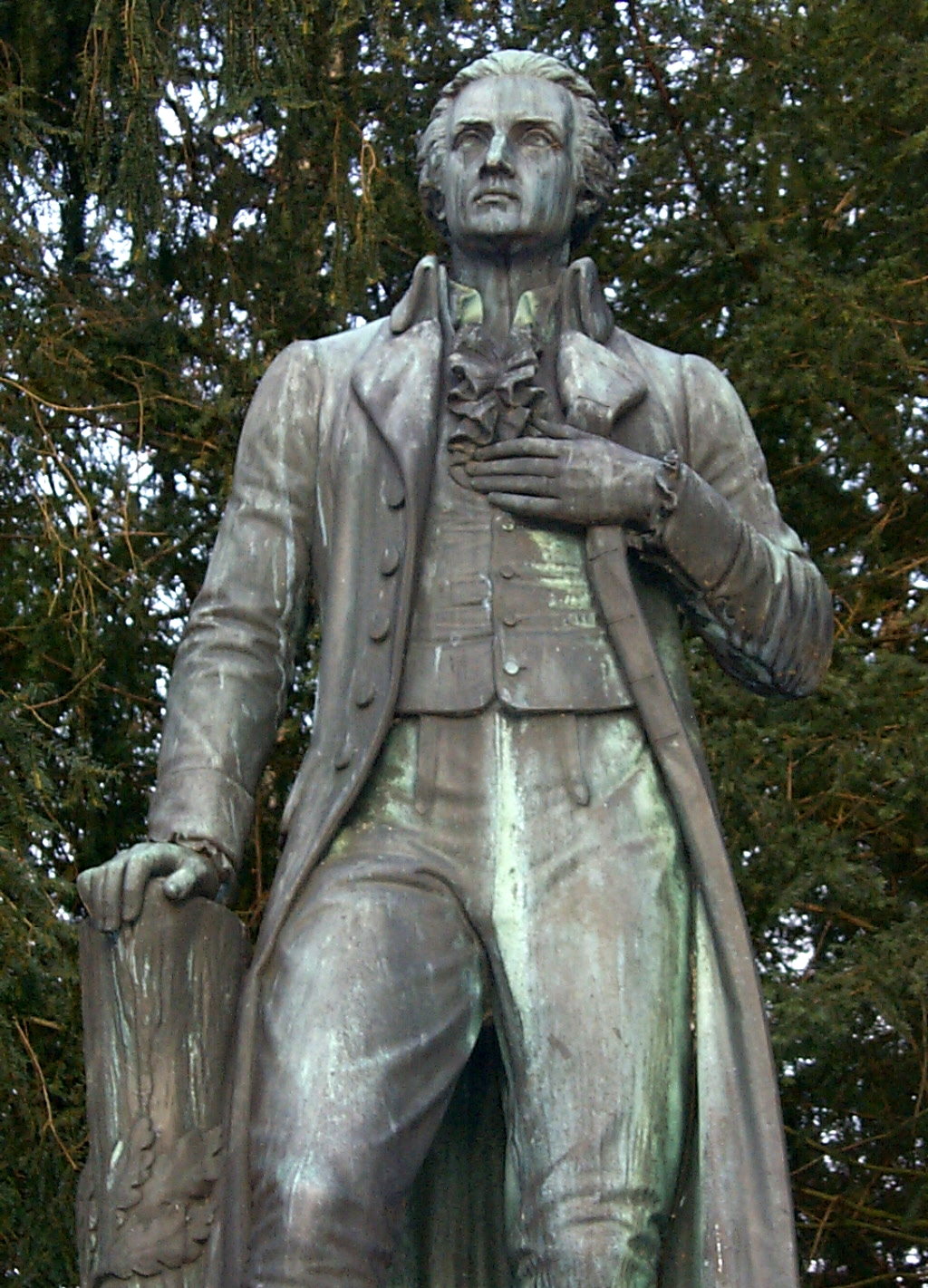 Johann Philipp Palm-Denkmal von Konrad Knoll im Palmpark / Braunau am Inn. Podestaufschrift J. PH. Palm. Den 26 Aug 1806